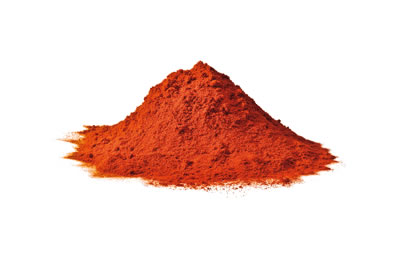 Pimentón Tap de Cortí